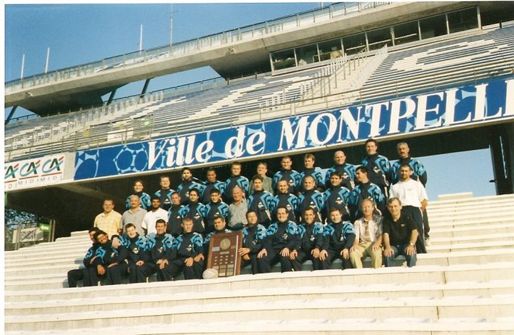 Pour célébrer la victoire en Championnat, l’Équipe complète pose avec le bouclier dans le Stade de la Mosson à Montpellier.